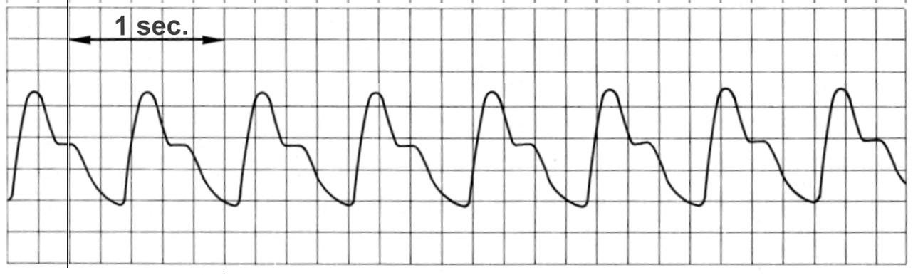 Plethysmogram van een Pulse-oxymeter